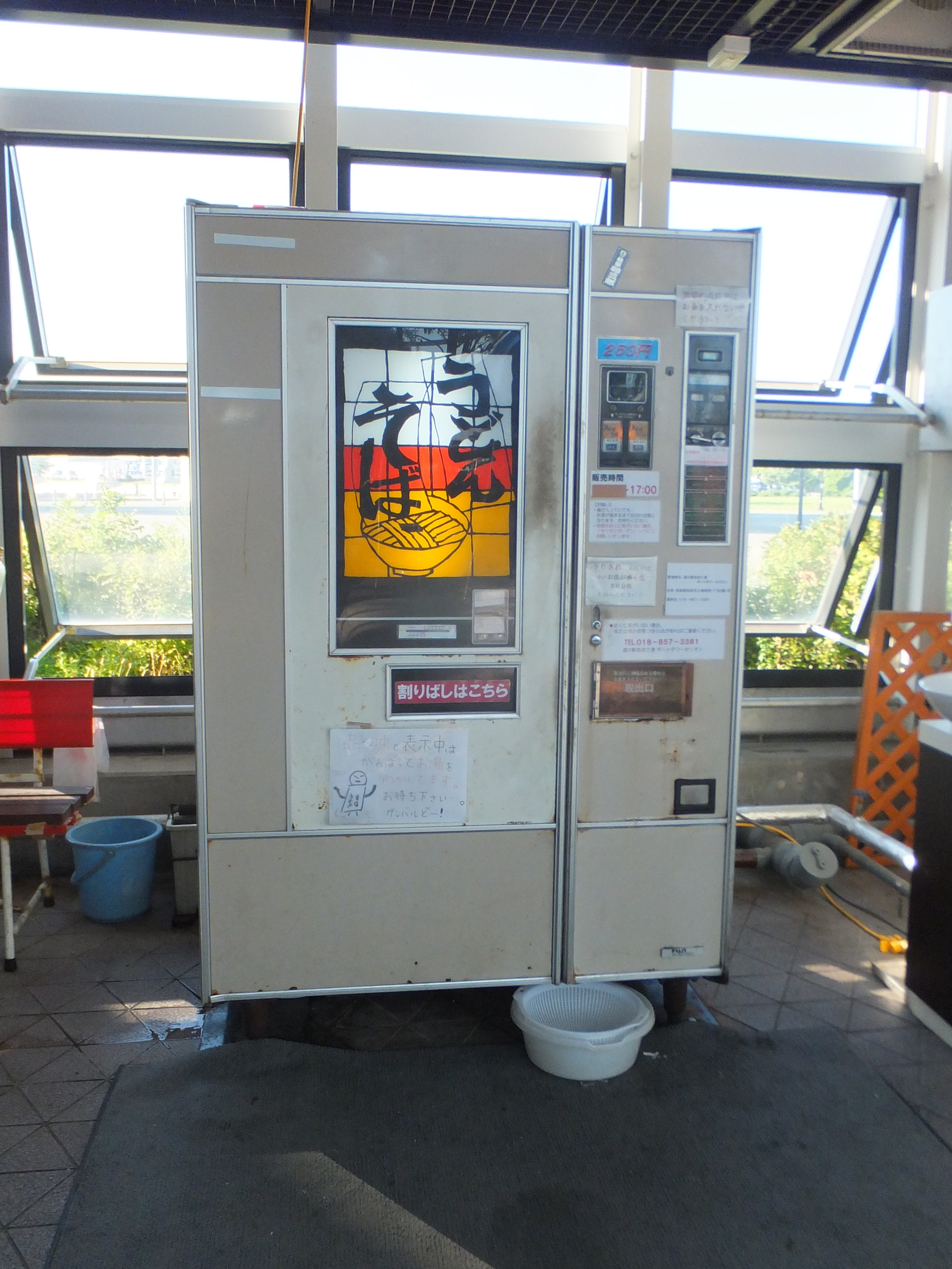 セリオンリスタ（秋田ポートタワー・セリオンに附属する屋内緑地）内にあるうどんの自動販売機